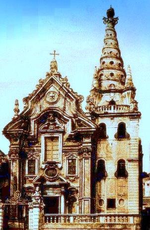 Chiesa di San Gregorio a Messina, progettata da Filippo Juvarra.